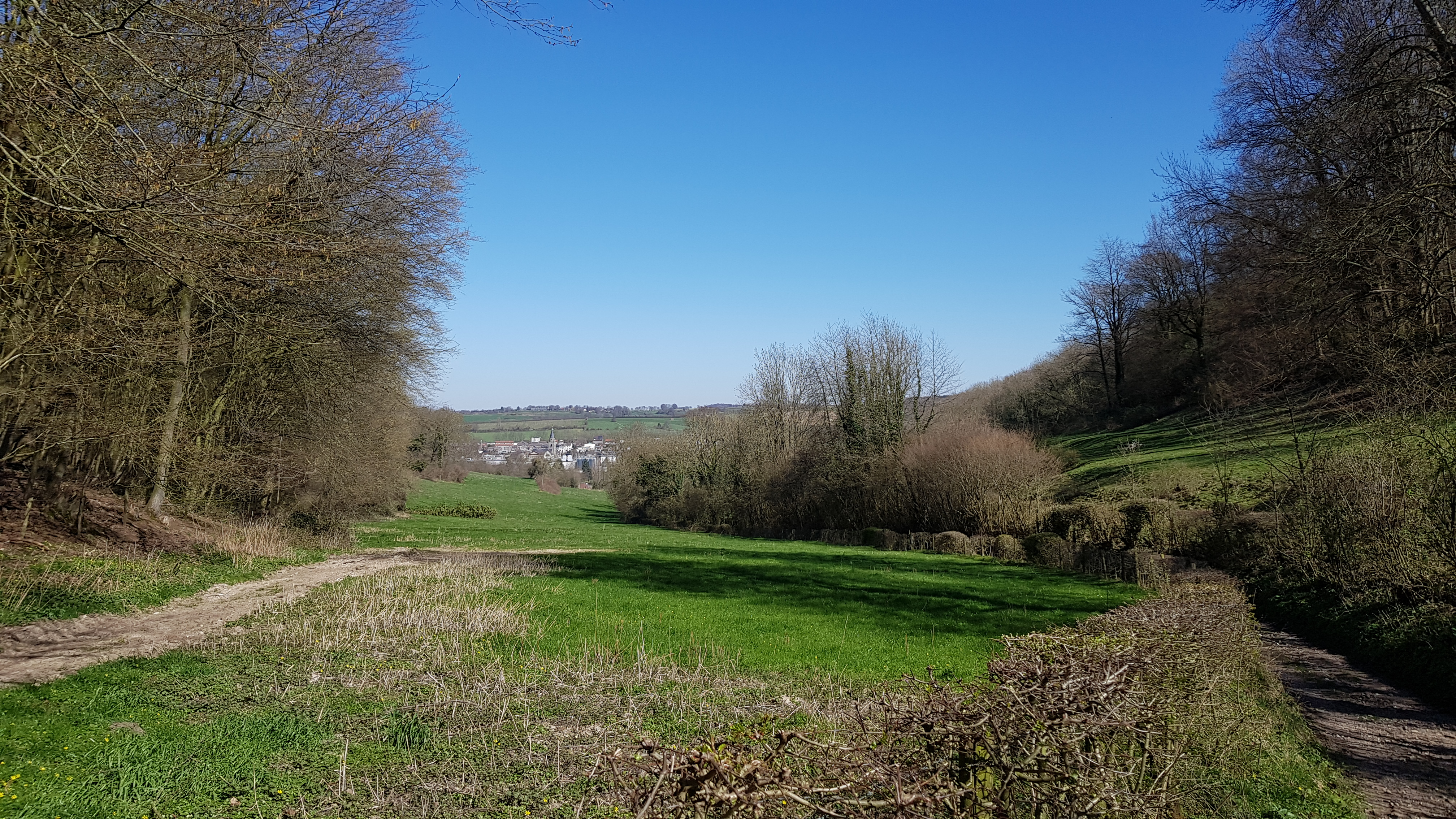 Beertsengrub bij Beertsenhoven, Wijlre, Nederland